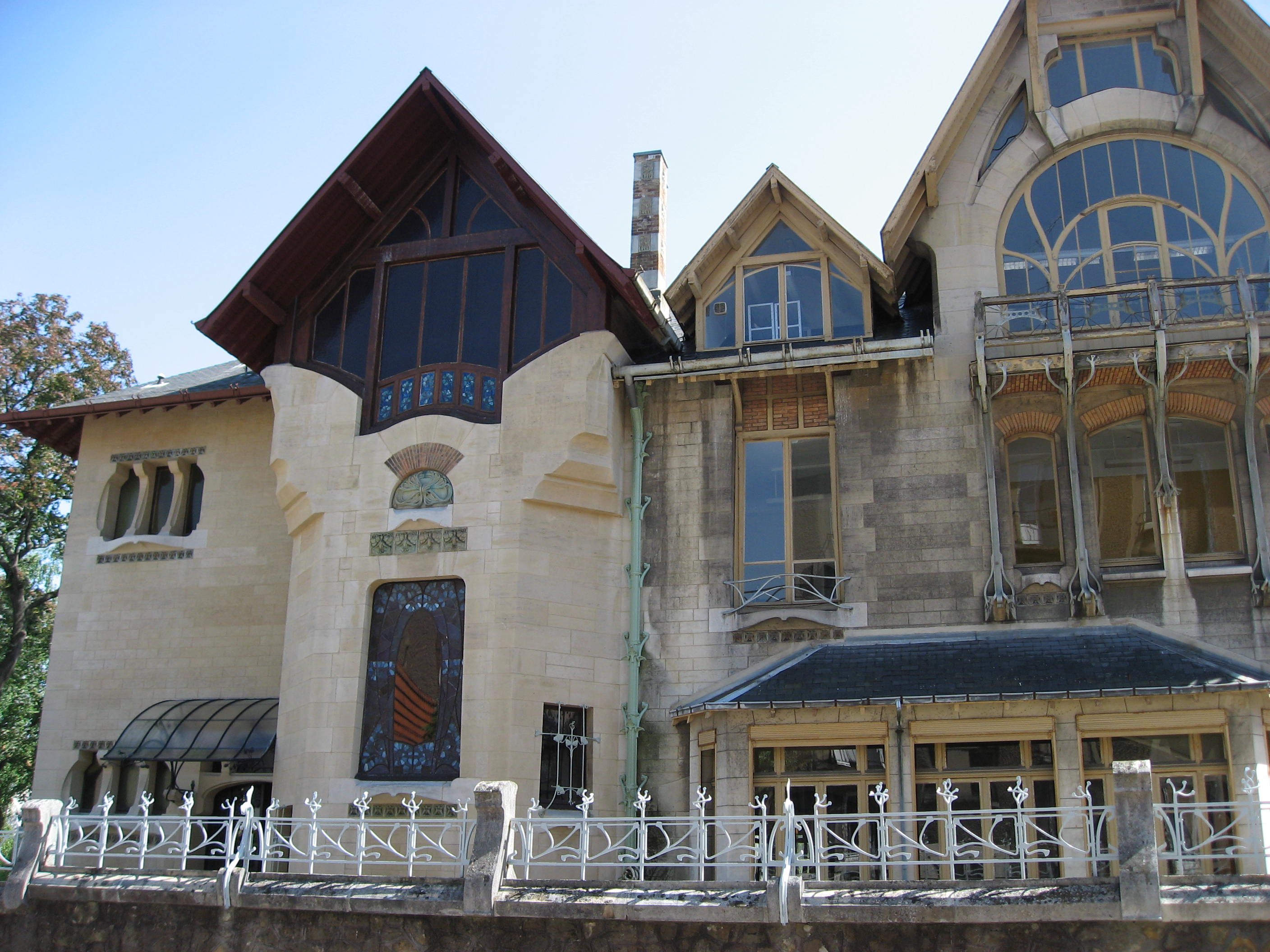 Villa Jika pour Louis Majorelle 1901-1902 1, rue Louis Majorelle 54000 Nancy Architecte: Henri Sauvage Vitraux: Jacques Grüber Ferronneries: Louis Majorelle Grès flammés: Alexandre Bigot Map: 48° 41' 8" N 6° 9' 50" E